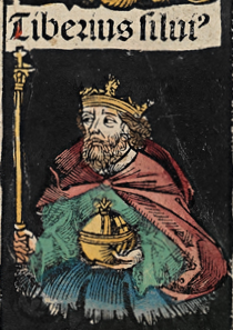 Зображення Тіберіна Сільвія у Нюрнберзькій хрониці.